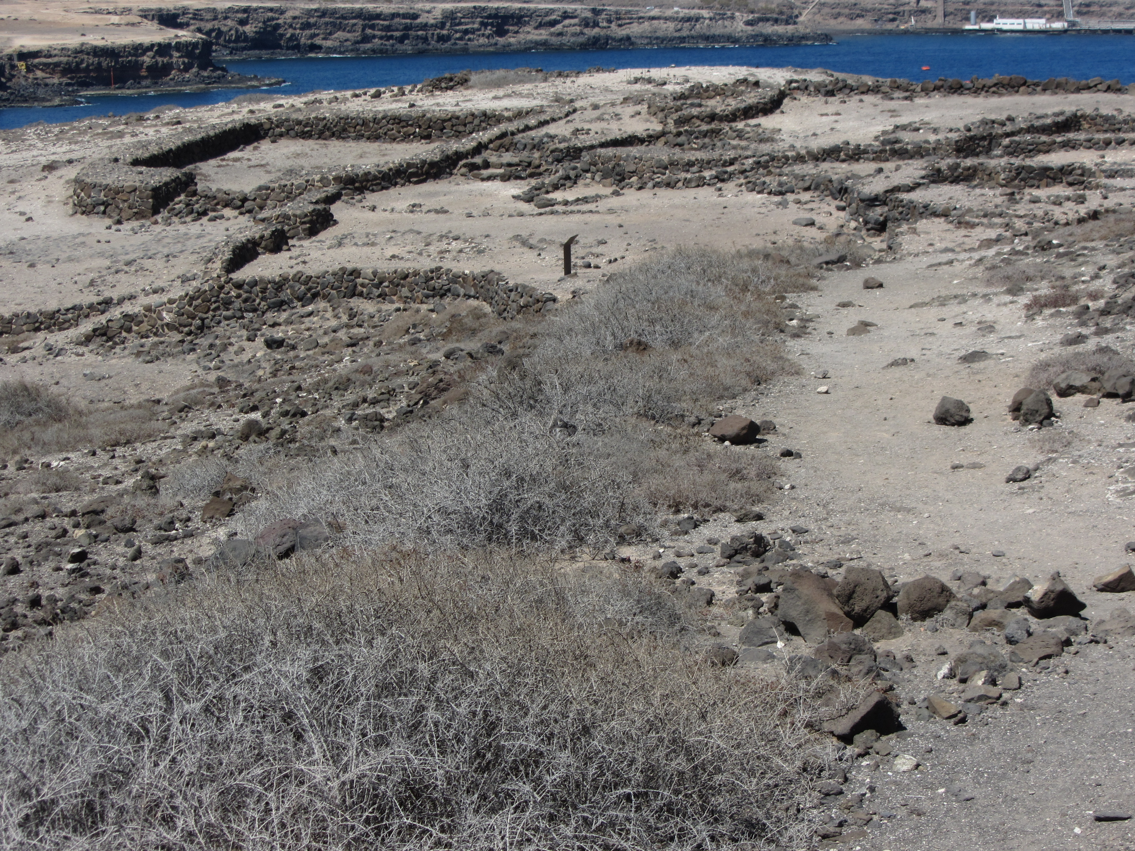 Tufia, Telde, Gran Canaria. El poblado prehispánico de Tufia estaba amurallado, algo que no es habitual en otros yacimientos arqueológicos.